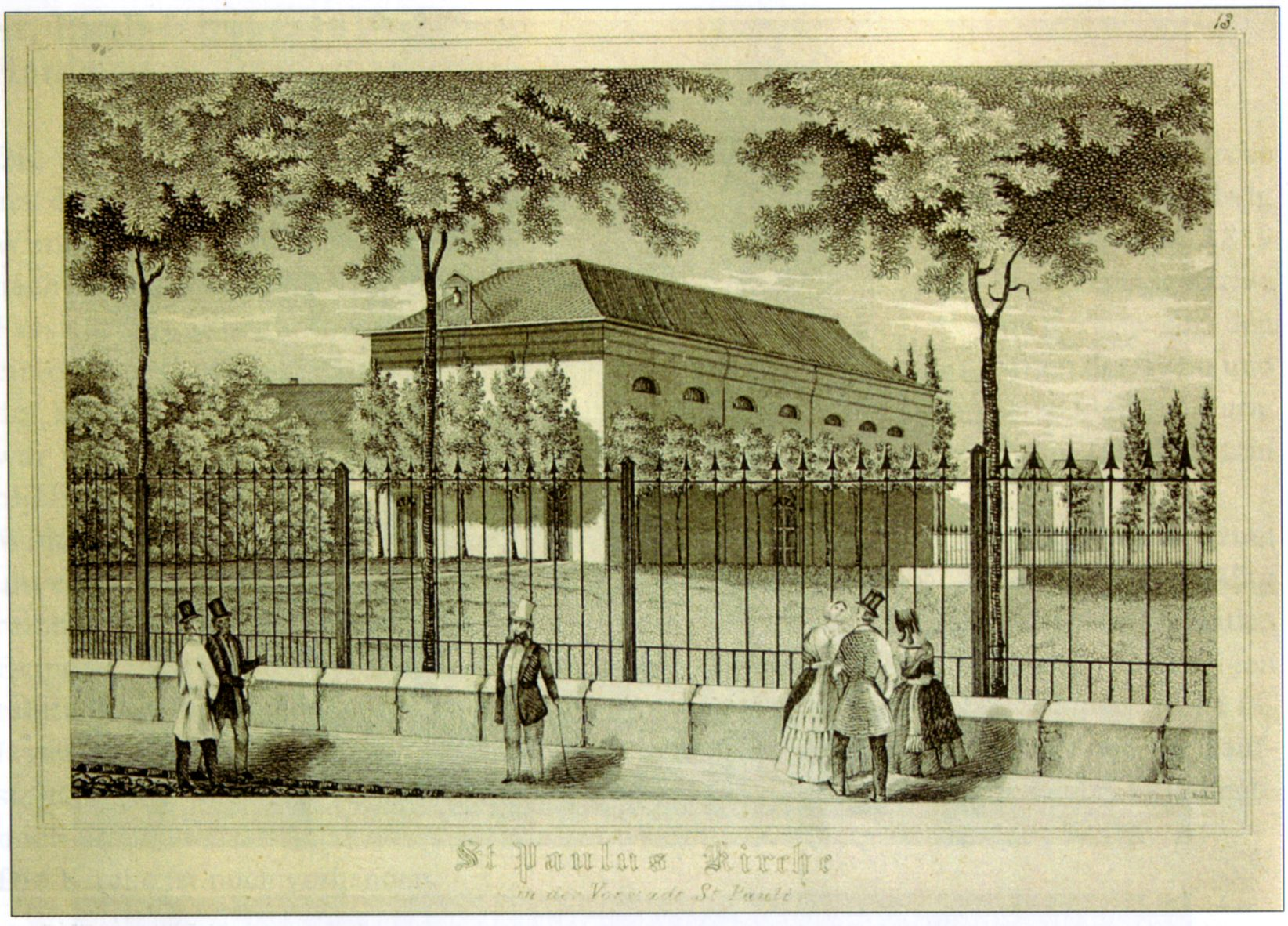 St. Pauli Kirche, Ansicht von Osten, Lithografie 1818